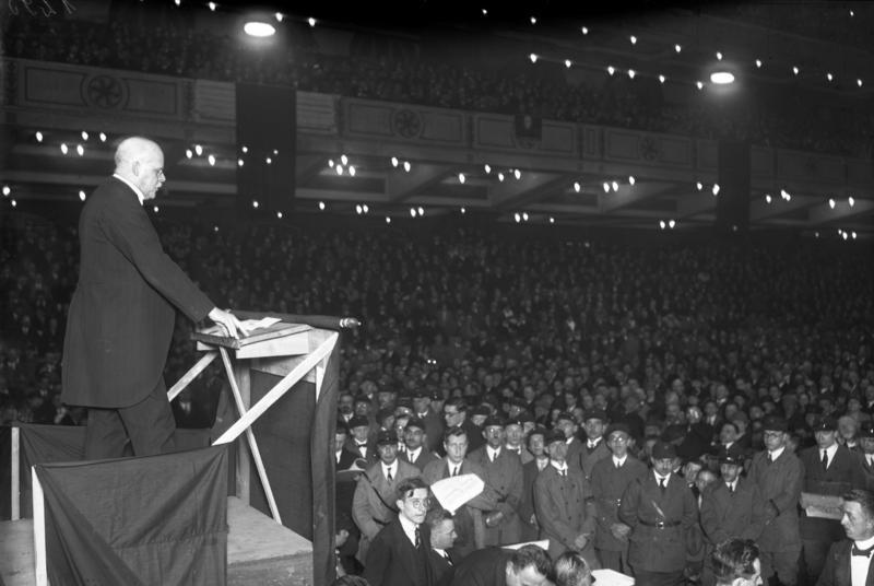 Wahlkundgebung des Volksblockes für die Kandidatur Marx fand am 17.4. unter riesenhafter Beteiligung im Berliner Sportpalast statt. Als Redner fungierten Kandidat Marx, Erkelenz Demokrat und Müller Sozialdemokrat. Reichskanzler Marx spricht von der Tribüne des Sportpalastes zu der Menschenmenge.